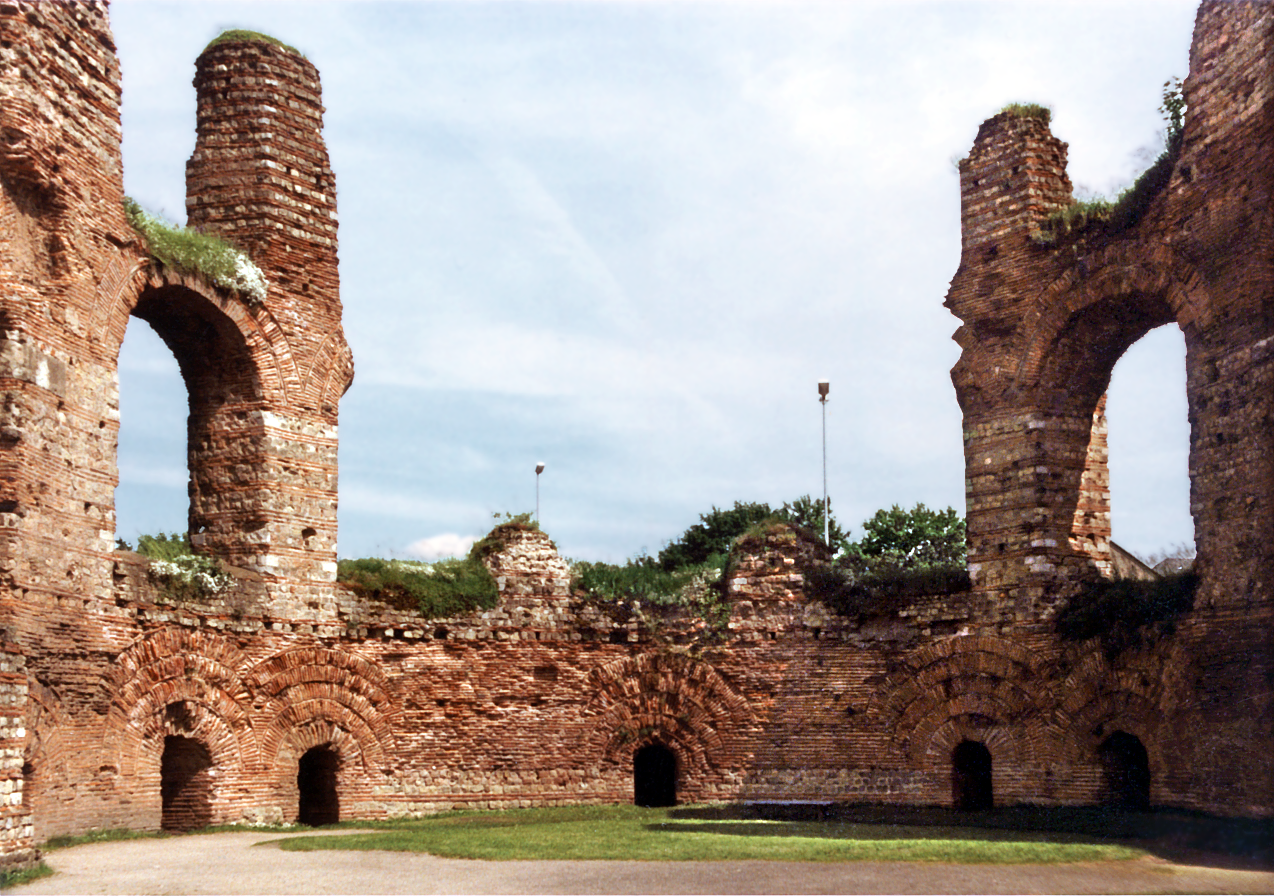 Die Hauptapsis der Kaiserthermen im Juni 1983. Im selben Monat wurde mit der umfangreichen Teilrekonstruktion zur Sicherung des Bauwerks begonnen. Gleichzeitig fand die Beseitigung von Kriegsschäden statt.